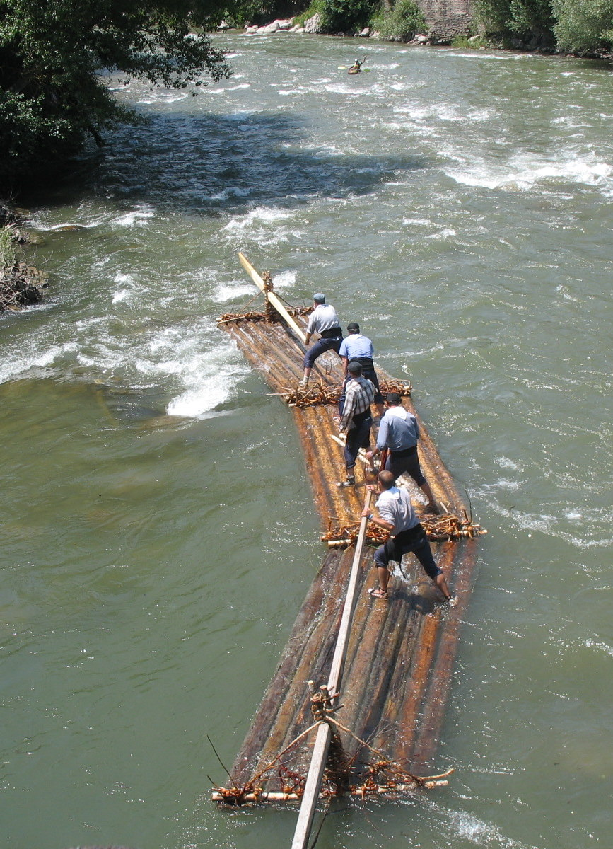 Bajada de raiers por el Noguera Pallaresa en Puebla de Segur. 3 de julio de 2011 (XXXIII Diada dels raiers)